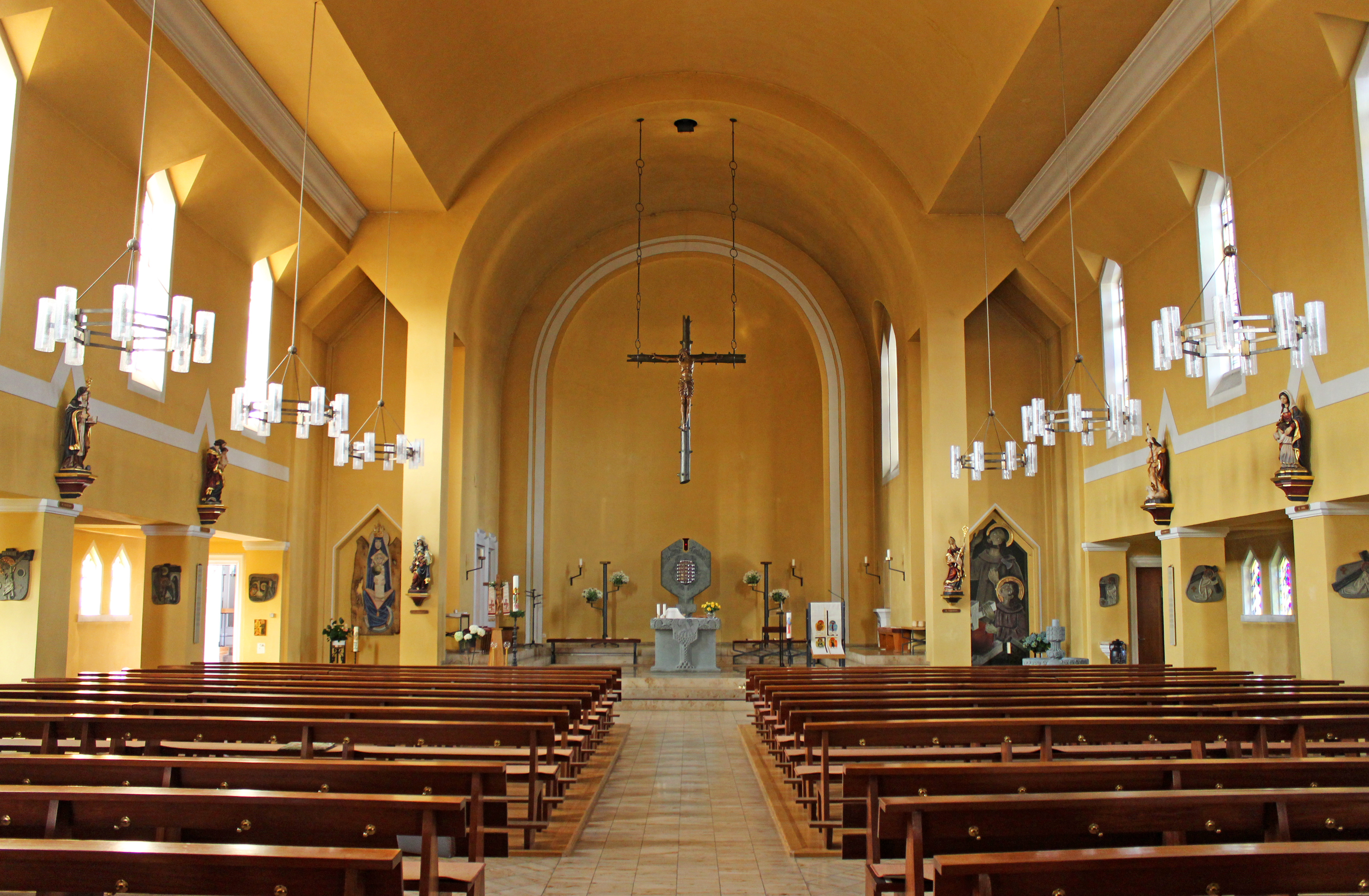 Blick ins Innere der katholischen Pfarrkirche St. Bonifatius in Püttlingen, Regionalverband Saarbrücken, Saarland